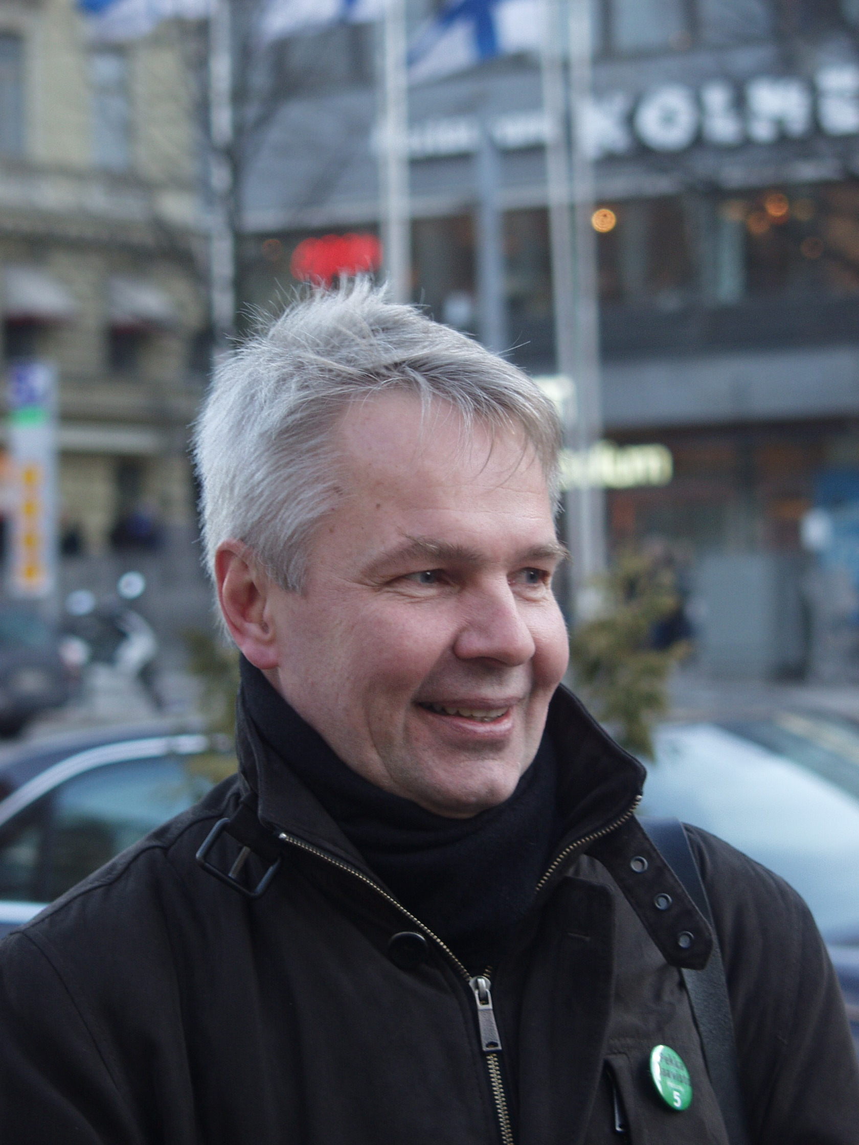 Pekka Haavisto Vihreiden vaalimökillä Kolmen sepän patsaalla huhtikuussa 2011